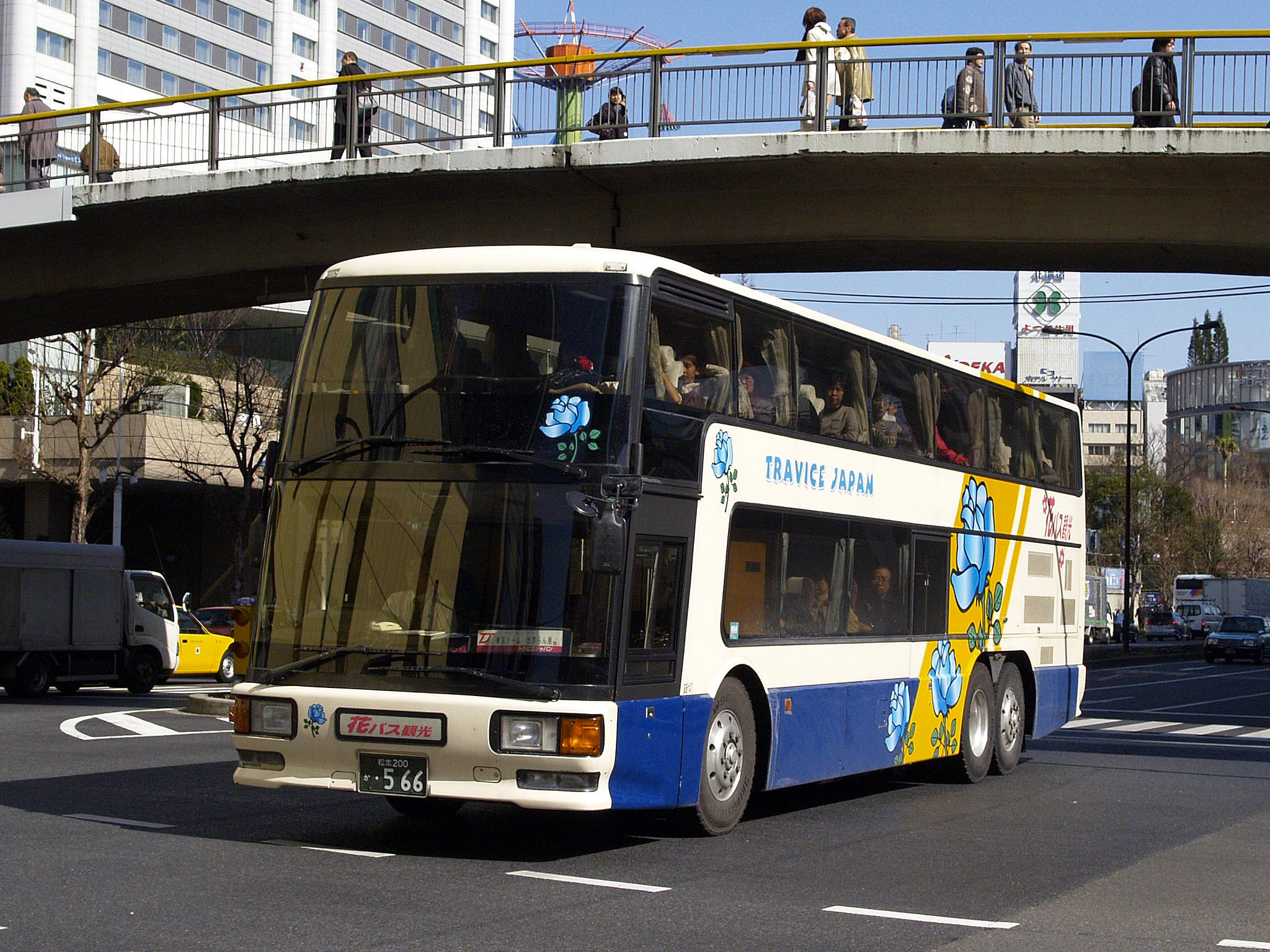 トラビスジャパンの三菱ふそうエアロキング。「花バス観光」のブランドで同社が運行する高速ツアーバスや自社主催ツアーに就役する。 型式：U-MU525TA（推測） 登録番号：松本200か・556 撮影地：東京都文京区、東京ドームシティ付近